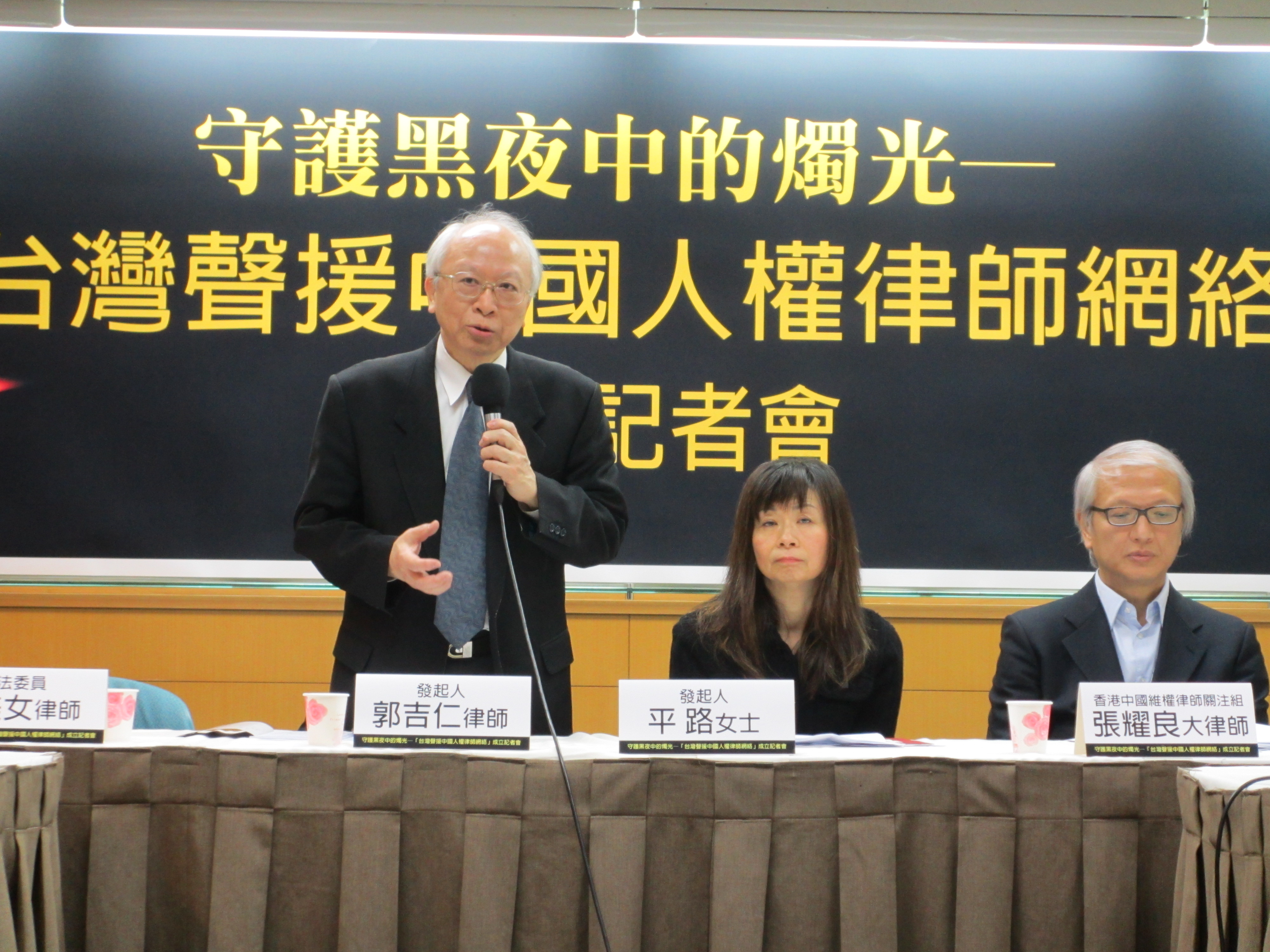 中國政府對於維權律師的迫害越來越嚴重，希望臺灣各界能更加關注中國的人權問題